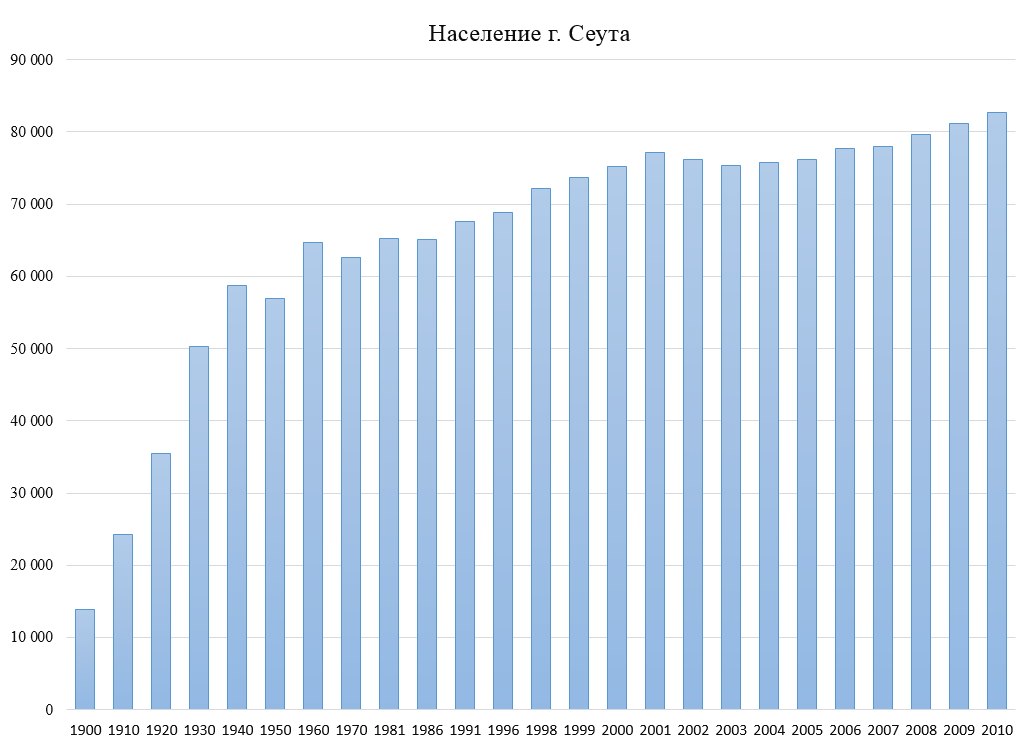 График численности населения г. Сеута